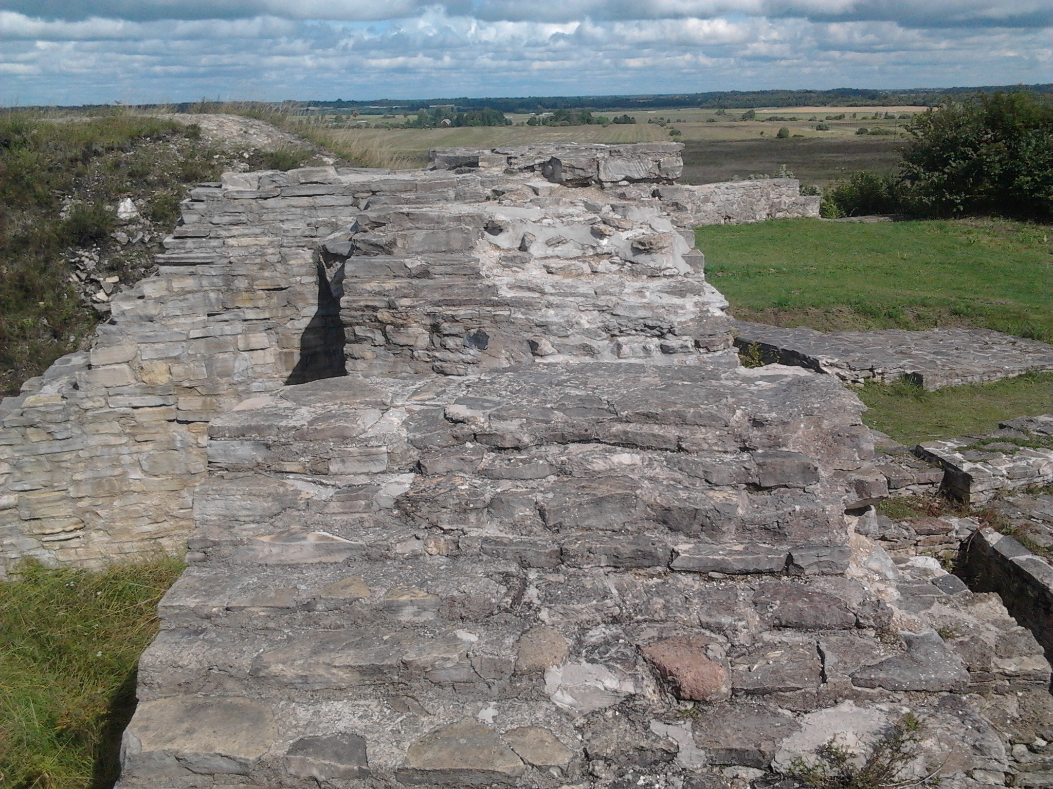 XIII. sajandis ehitatud Saare-Lääne piiskopi teise residentsi varemed.